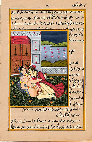 Kama Sutra Illustration